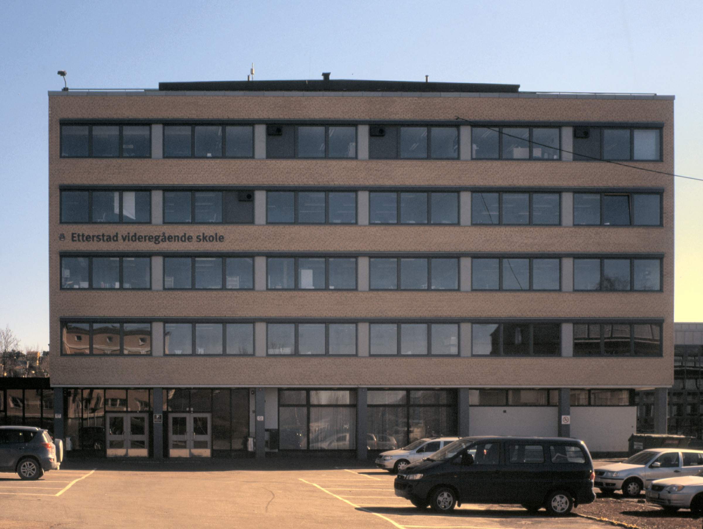 Dette er et bilde av Etterstad videregående skole fra 2008.